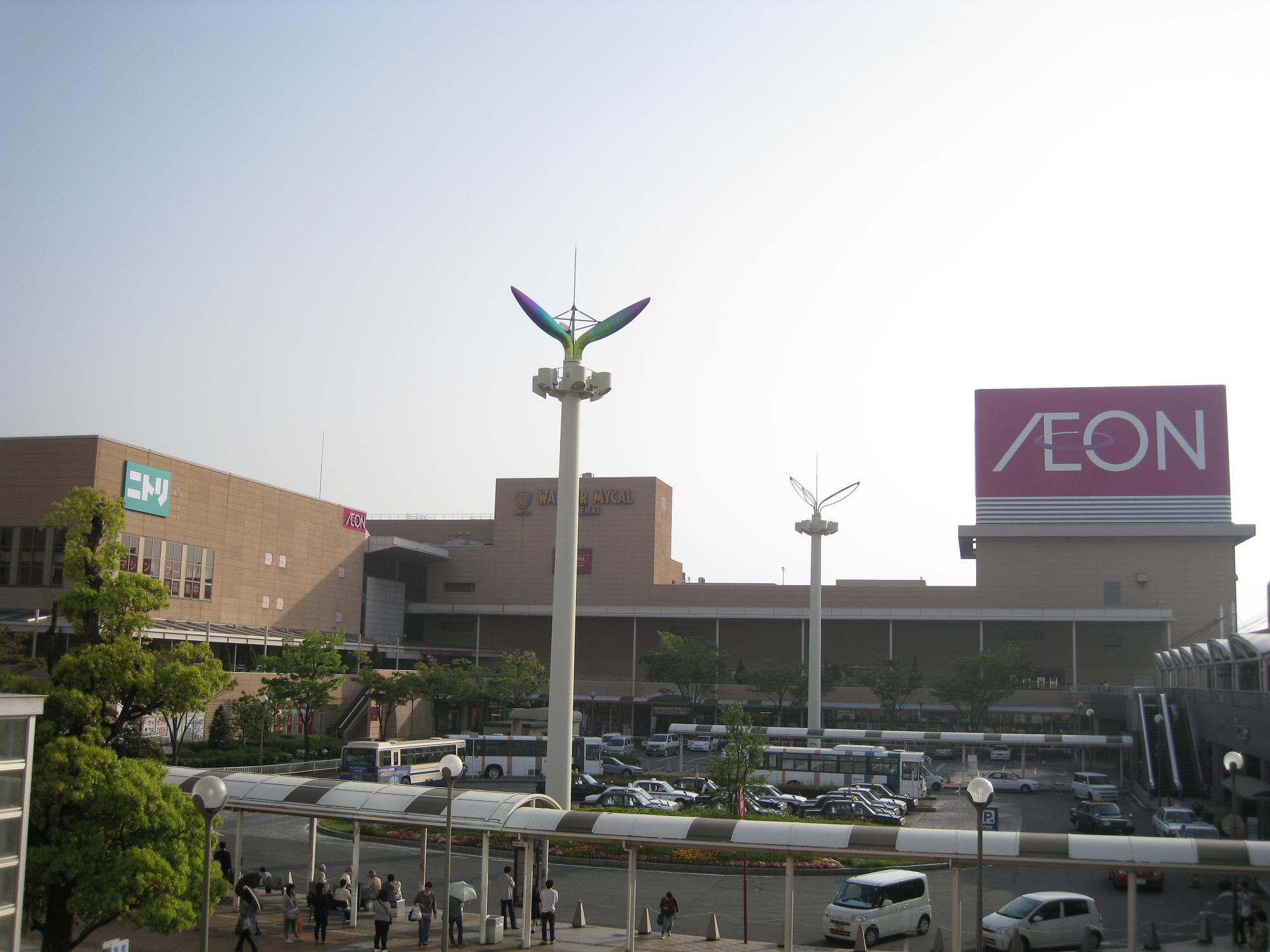 イオン戸畑ショッピングセンター